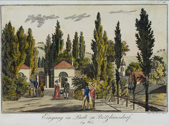 Wien, Vorstädte